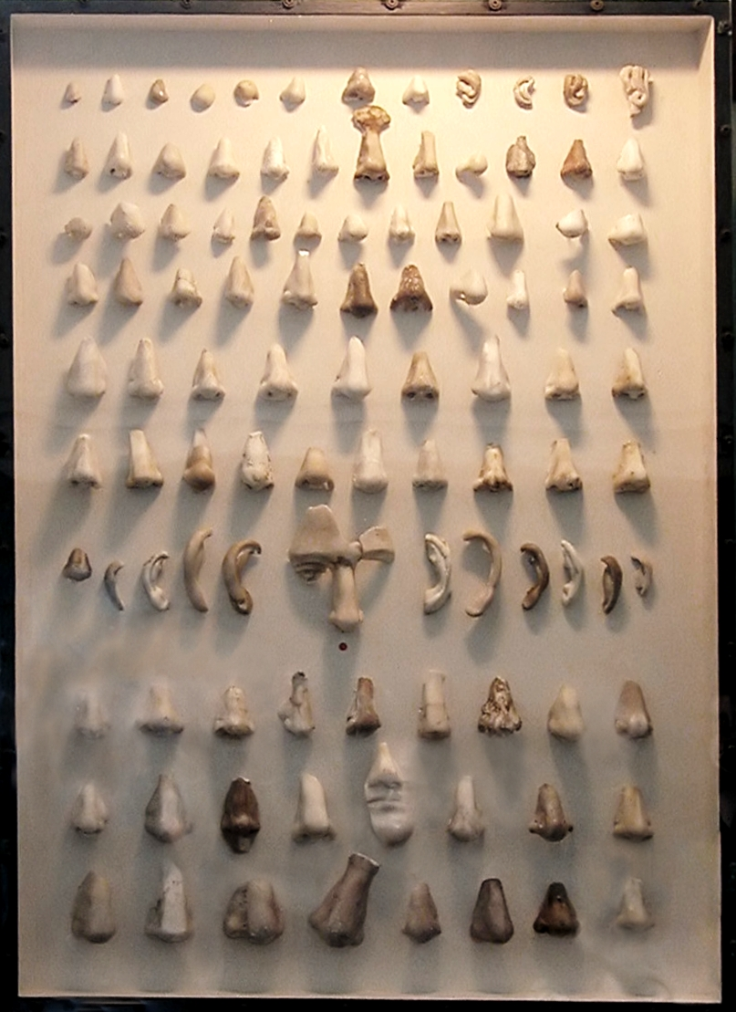 Nasothek in der Ny Carlsberg Glyptothek, Kopenhagen